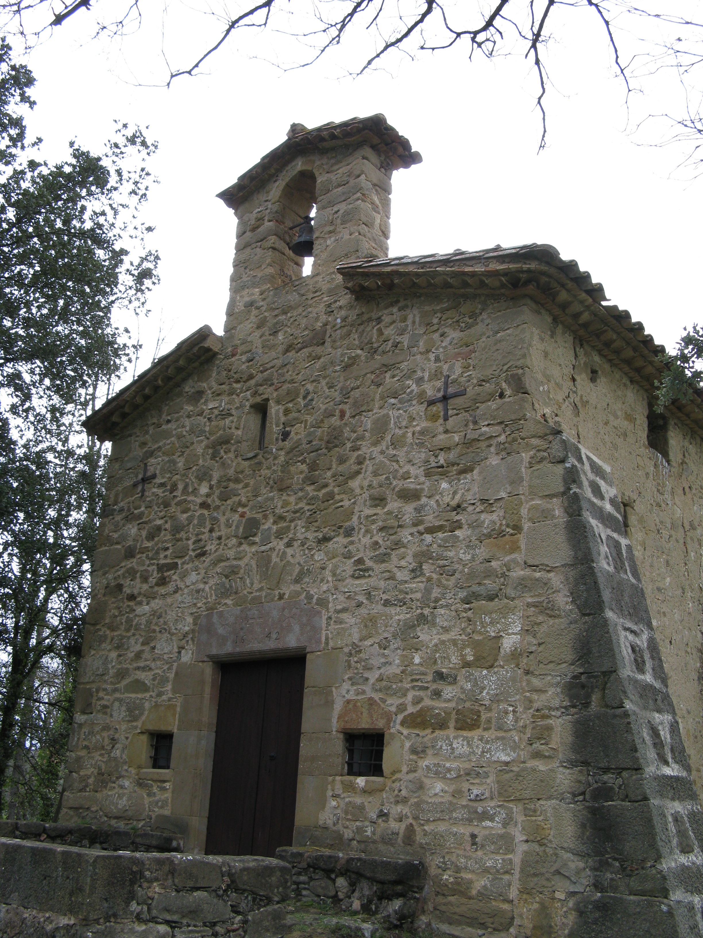 Ermita de Sant Simplici, Hostalets, Val d'en Bas, Catalunya